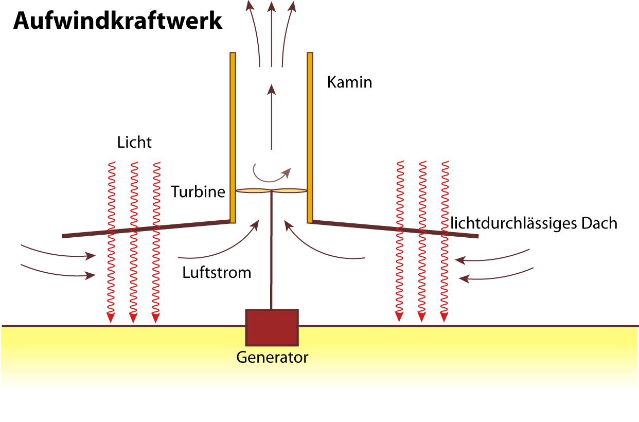 Grober Aufbau eines Thermikkraftwerk